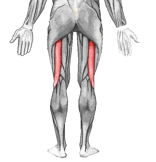 Músculo biceps femoral